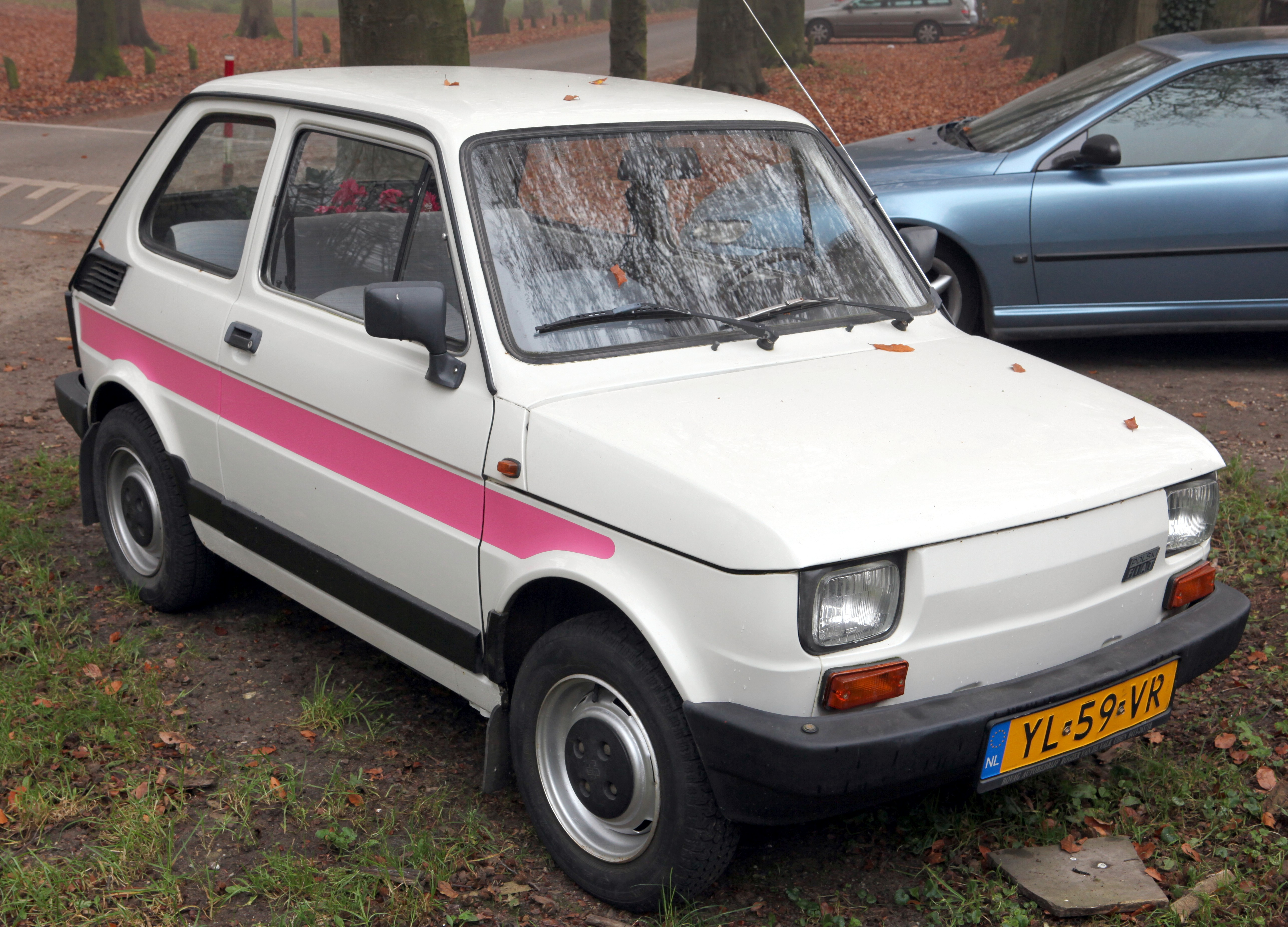 Polski Fiat 650 E Limited Edition